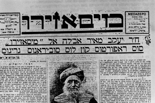 "Messagero".